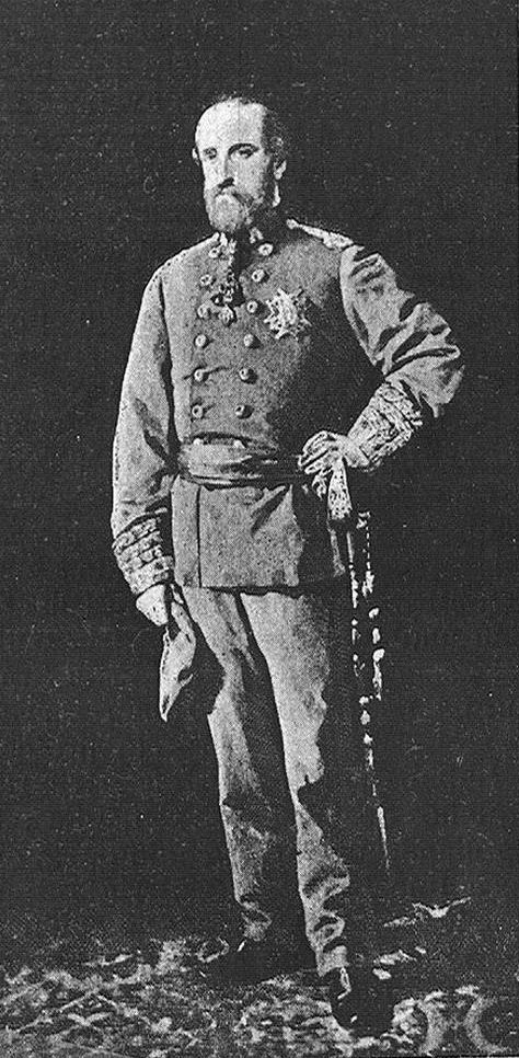 Juan de Borbón, padre de Carlos VII.